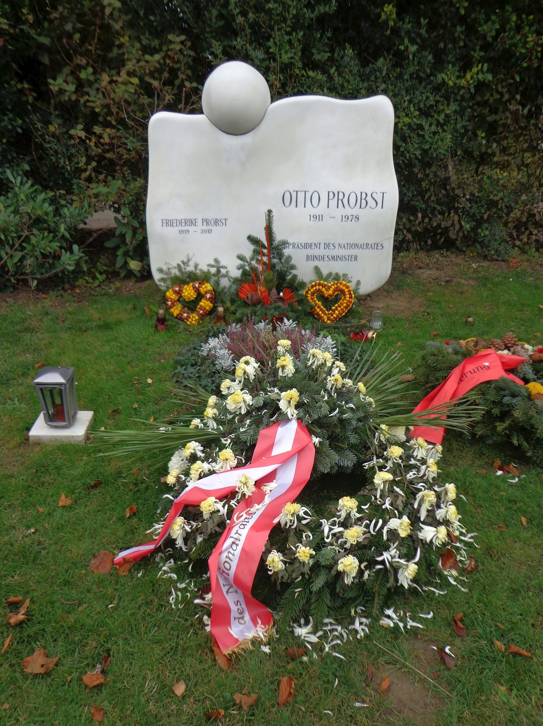 Wiener Zentralfriedhof - Gruppe 14 C - Grab von Otto Probst